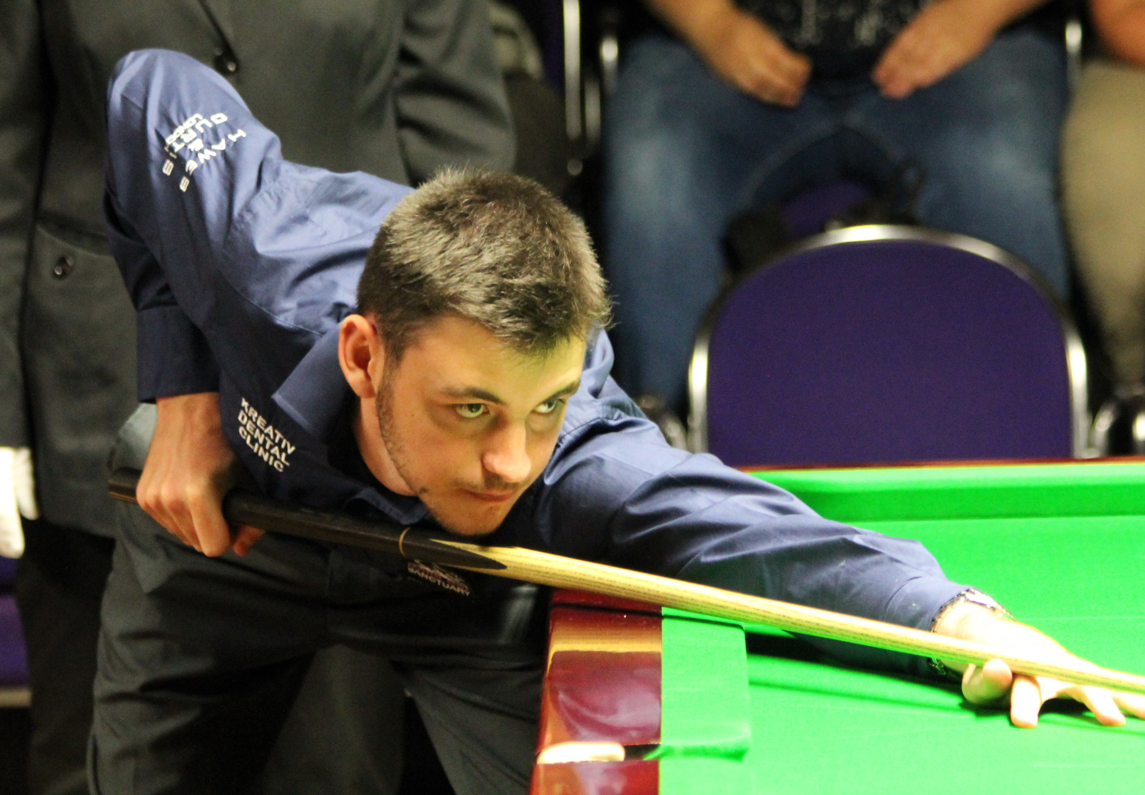 Darryl Hill beim Paul Hunter Classic 2015